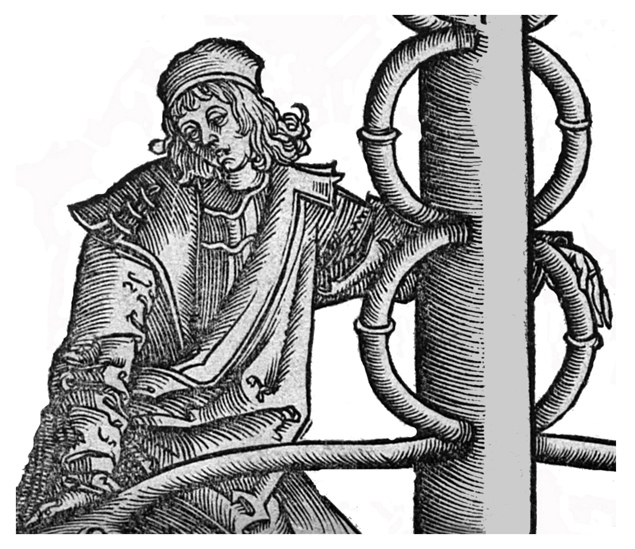 Autorenportrait